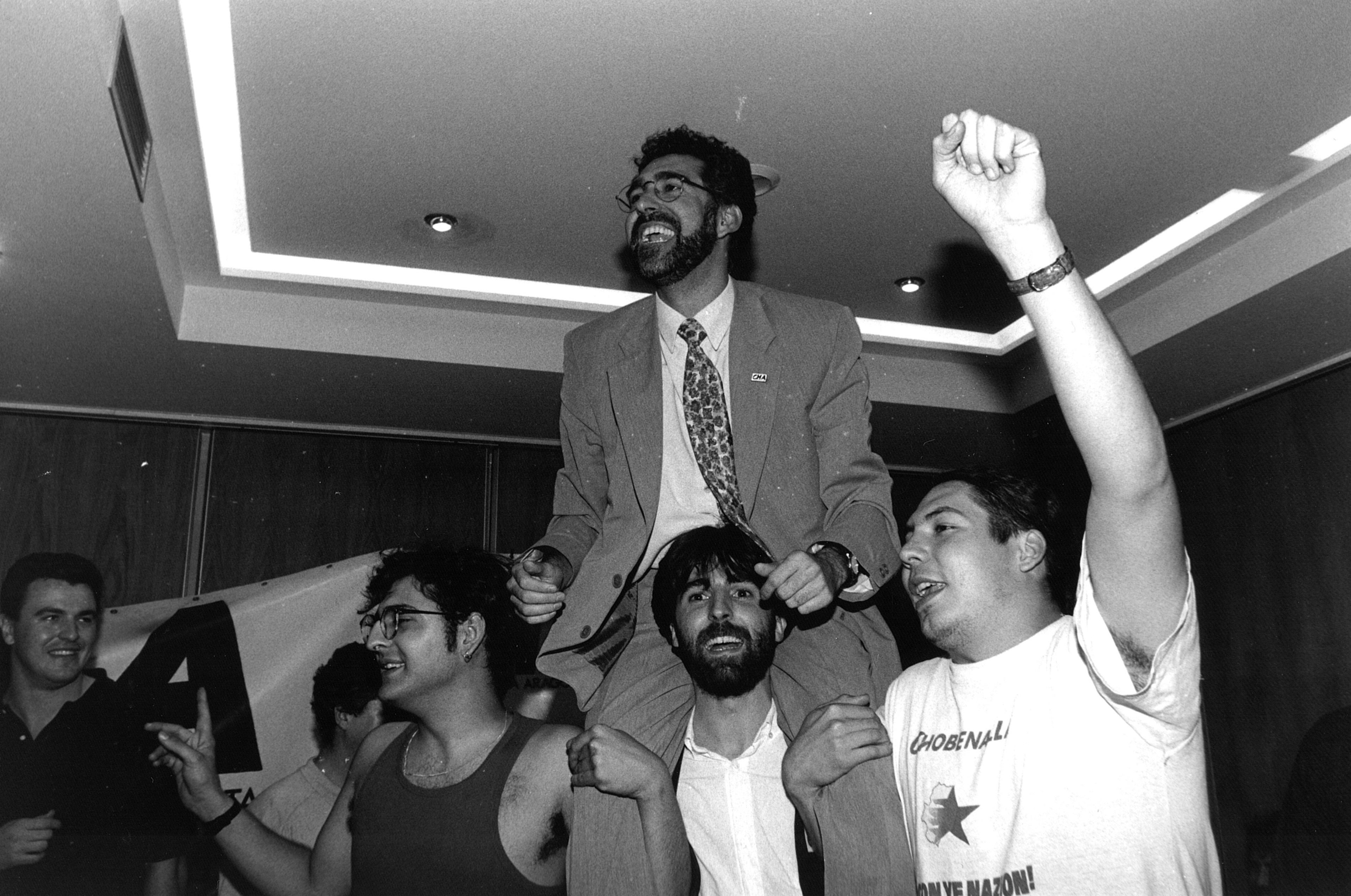 Chesús Bernal celebrando la entrada de CHA en las Cortes de Aragón